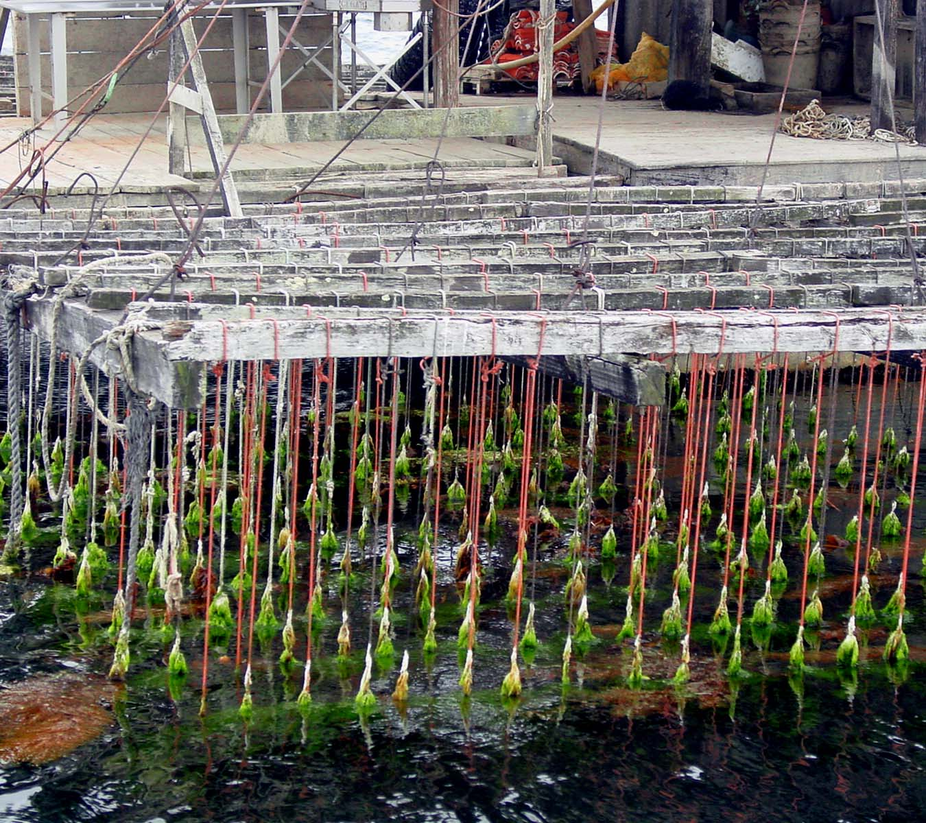 Viveiros de ostras e mexillóns nas Rías Baixas Viveiros de ostras e mexilhões Mussels and oysters fisheries